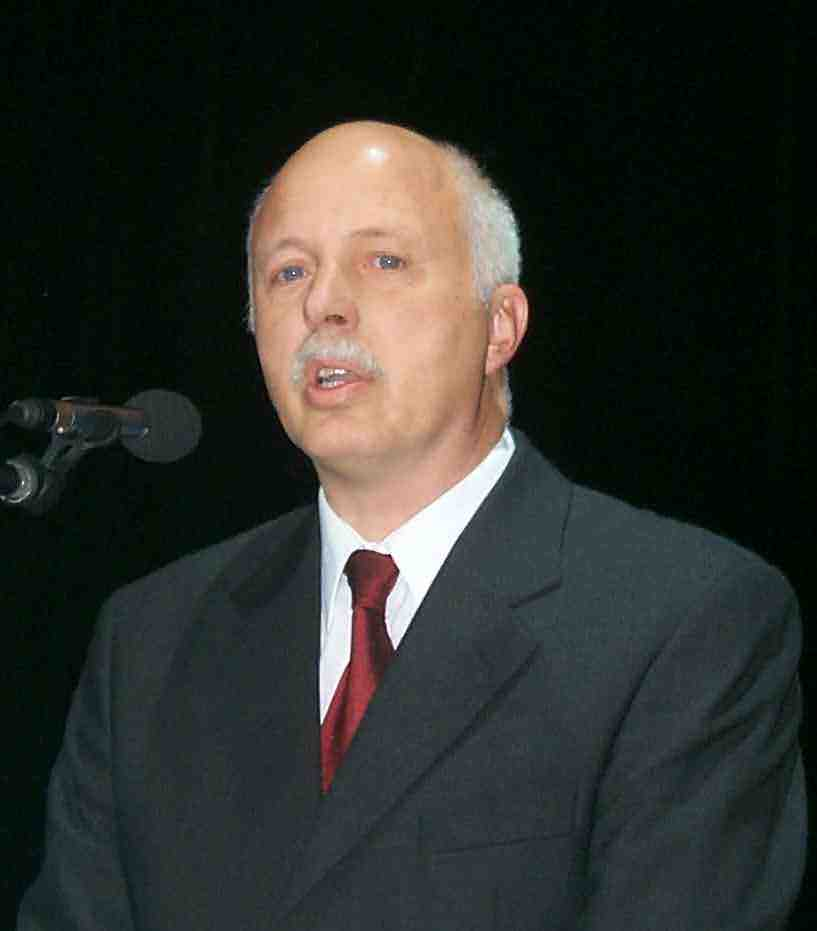 Rektor Rainer Scheithauer von der HFU Hochschule Furtwangen im Jahr 2000.